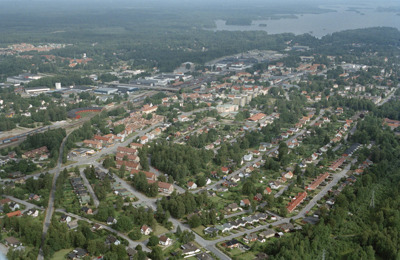 Bilden är tagen mot (väderstreck): N Motiv: Älmhult Nyckelord: Flygbilder, Riksintressen Kategori: Miljöer, TätortBilden är tagen mot (väderstreck): N.